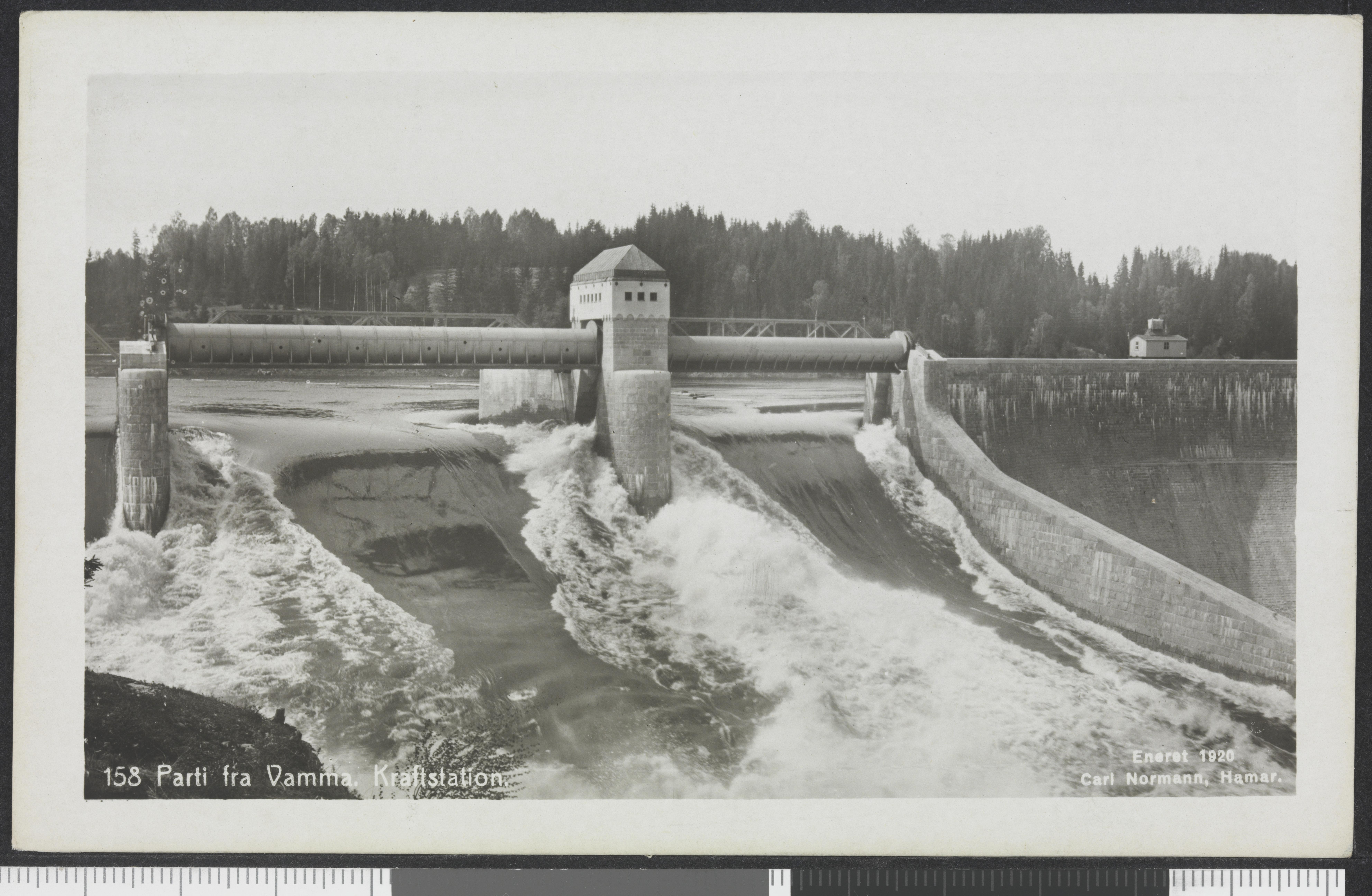 Bildet er hentet fra Nasjonalbibliotekets bildesamling Vamma, Askim, Østfold